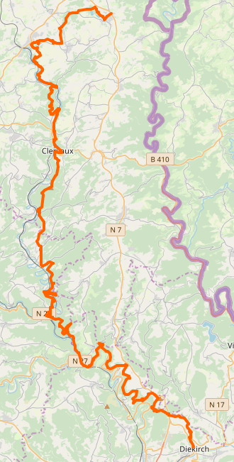 Streck vum Nord-Pad